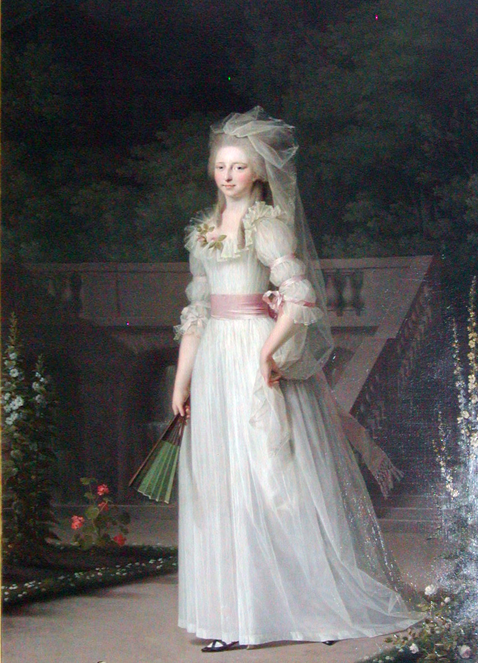 Danish: Maleriet var oprindeligt i den augustenborgske slægts eje. Efter 1850 blev augustenborgernes godser konfiskeret af den danske stat, og slægten måtte drage i landflygtighed med sit indbo til dens schlesiske ejendomme. Ved Ernst Günthers død i 1921, uddøde den augustenborgske mandslinje, og godset og indboet tilfaldt flere forskellige kvindelige medlemmer af slægten, der, som følge af den almindelige fattigdom i Tyskland i kølvandet på 1. verdenskrigs afslutning, besluttede at realisere effekterne. Samlingen, som bestod af talrige kunstværker og genstande med tilknytning til det danske kongehus, blev solgt enkeltvis og i mindre portioner. I 1930 var en mindre samling af effekterne endt i Matthies antikvitetshandel i Berlin. Her købte museumsinspektør Otto Andrup hele samlingen på 300 genstande, bestående af malerier, møbler og bl.a. sølvtøj, for ca. 120.000 kr. Købet var lidt af en satsning fra Andrups side, idet han på grund af juleferie, ikke havde kunnet komme i kontakt med Frederiksborgmuseets bestyrelse, og dermed ikke havde bemyndigelse til det store udlæg. Købet blev derfor officielt foretaget af Andrup selv, på trods af at han ikke selv havde sådanne midler til rådighed. Det lykkedes dog et par dage efter for Andrup at få bestyrelsen til at acceptere købet, som bl.a. indeholdt dette maleri af prinsesse Louise Augusta, malet af Jens Juel. Frederiksborgmuseet udvalgte end del genstande til den nationalhistoriske udstilling og resten blev efterhånden bortsolgt til anden side. Kilde: Zelia N. Andrup, Otto Andrup og livet omkring ham, Rosenkilde og Bagger, 1970, s. 118-125.